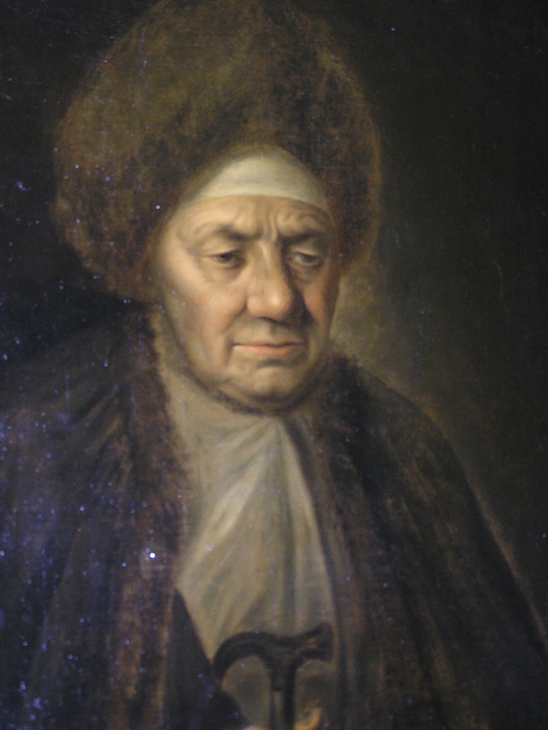 Marfa (Xenia) Romanova